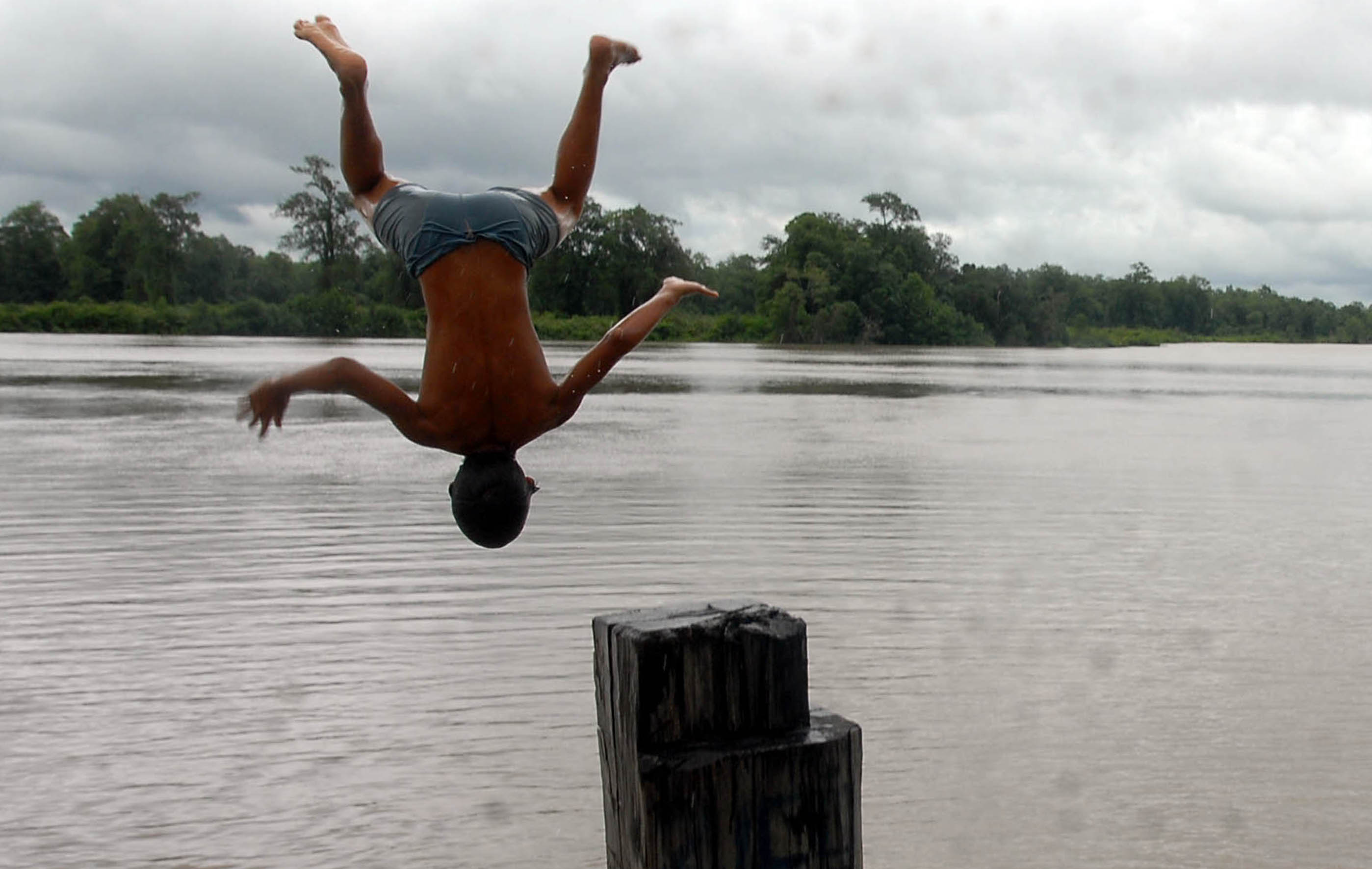 Nova Santarém (PA) - Meninos brincam às margens do Rio Maracanã.